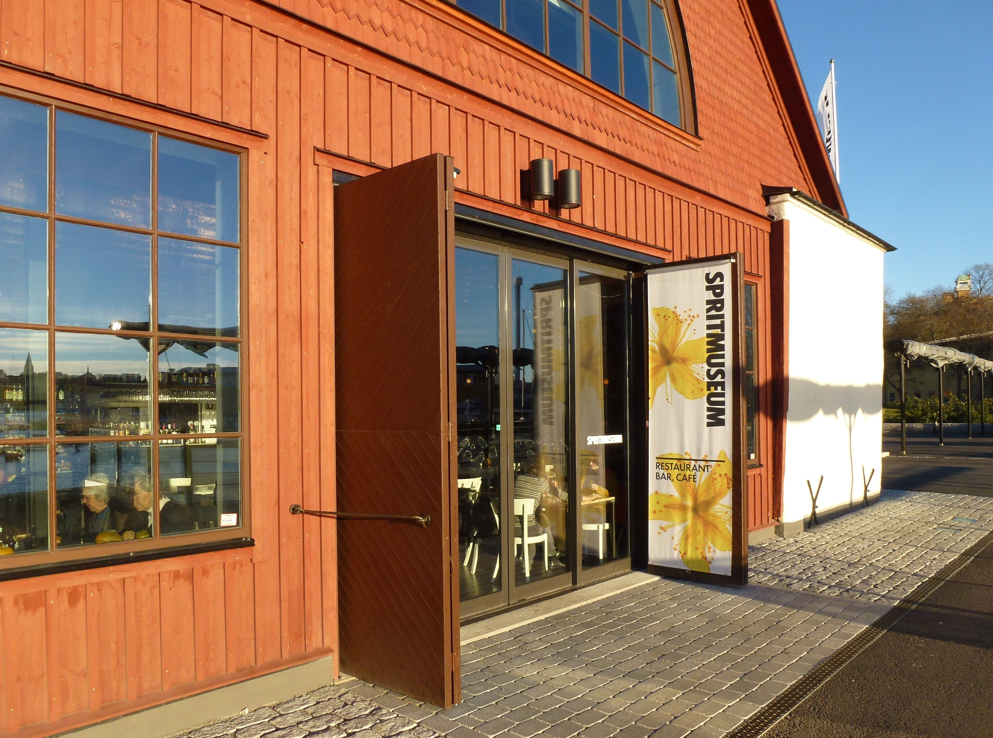 Spritmuseum i Stockholm